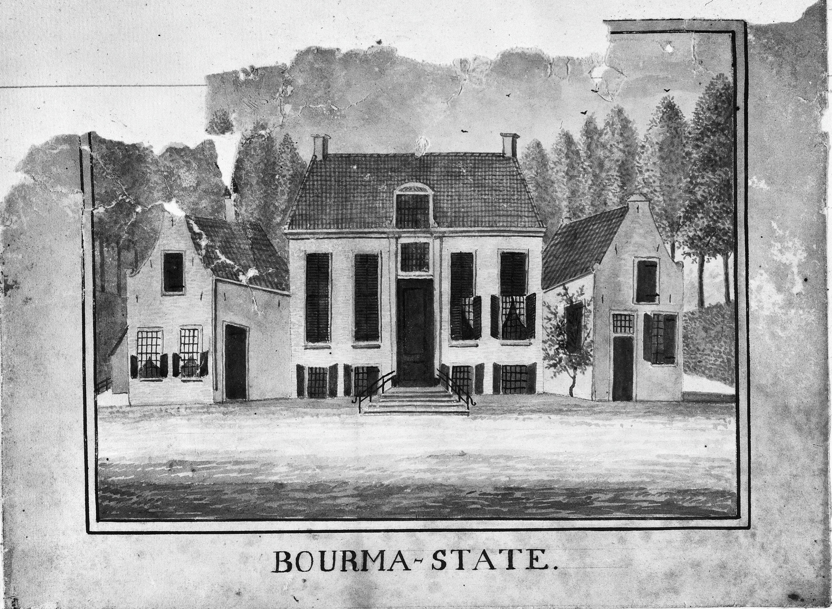 Diversen: Bourma-state, reproductie van originele tekening in bezit van de heer Wielinga, Huis Voormeer, Heerenveen